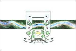 Bandeira de Jardim de Piranhas, Rio Grande do Norte, Brasil.